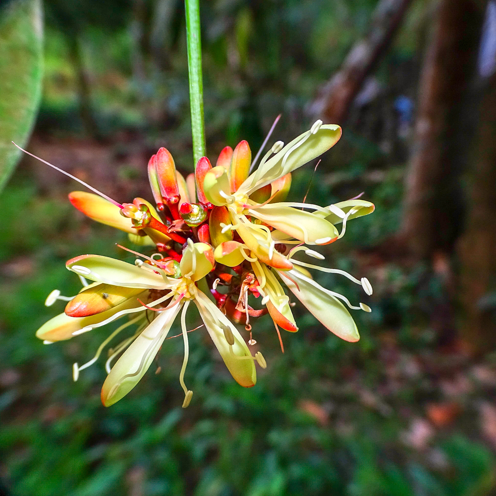 Quassia indica, Niepa Bark Tree, karigotta. From Ezhupunna